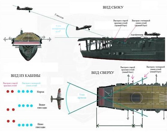 Схема оптического привода на посадку авианосцев ВМС Императорской Японии